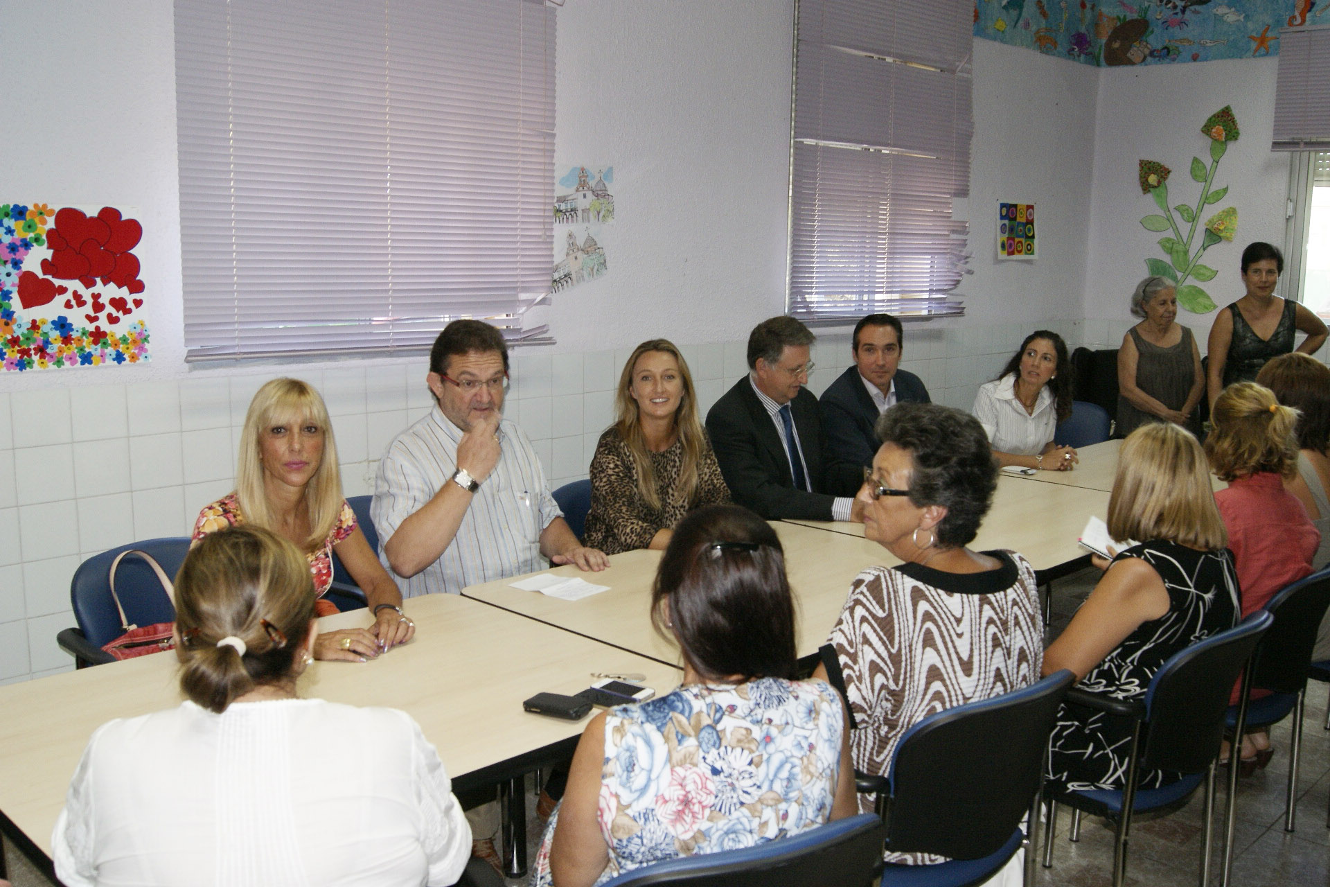 La Secretaria Ejecutiva de Política Social del Partido Popular de la Comunitat Valenciana, Andrea Fabra, la secretaria general del PP de la provincia de Castellón, Marisol Linares, y diferentes cargos populares